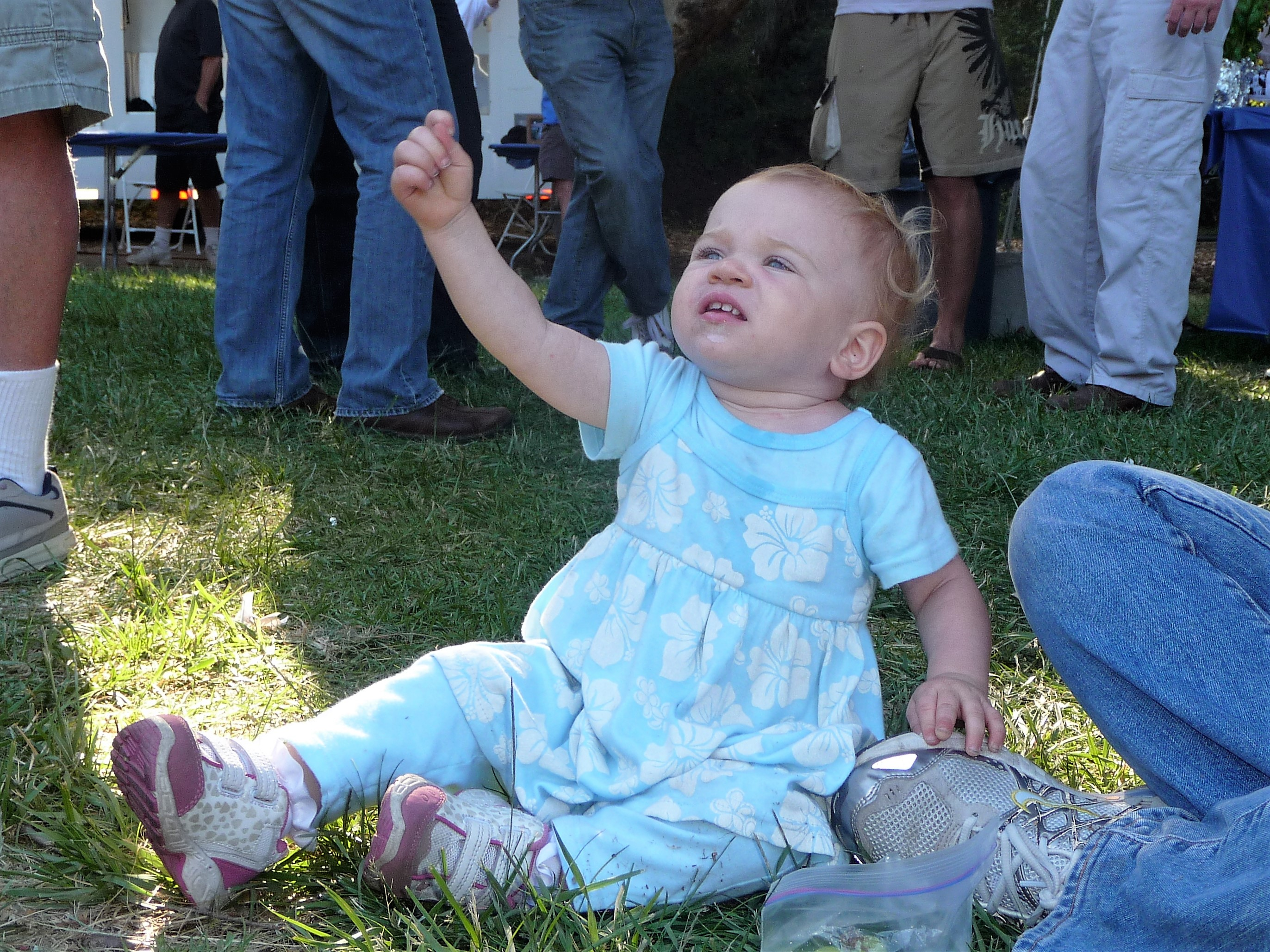 Ein Kleinkind gebärdet das Zeichen "bird" (engl., 'Vogel') in Baby sign language (engl., 'Babygebärden'), hier bei einer Open-Air-Veranstaltung in Santa Barbara in Kalifornien, USA.